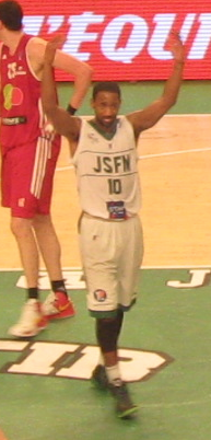 David Lighty qui lève les bras pour demander des encouragements au public de Nanterre. 4ème et dernier match de finale des playoffs du championnat de basketball 2012-2013 entre Nanterre et Strasbourg.